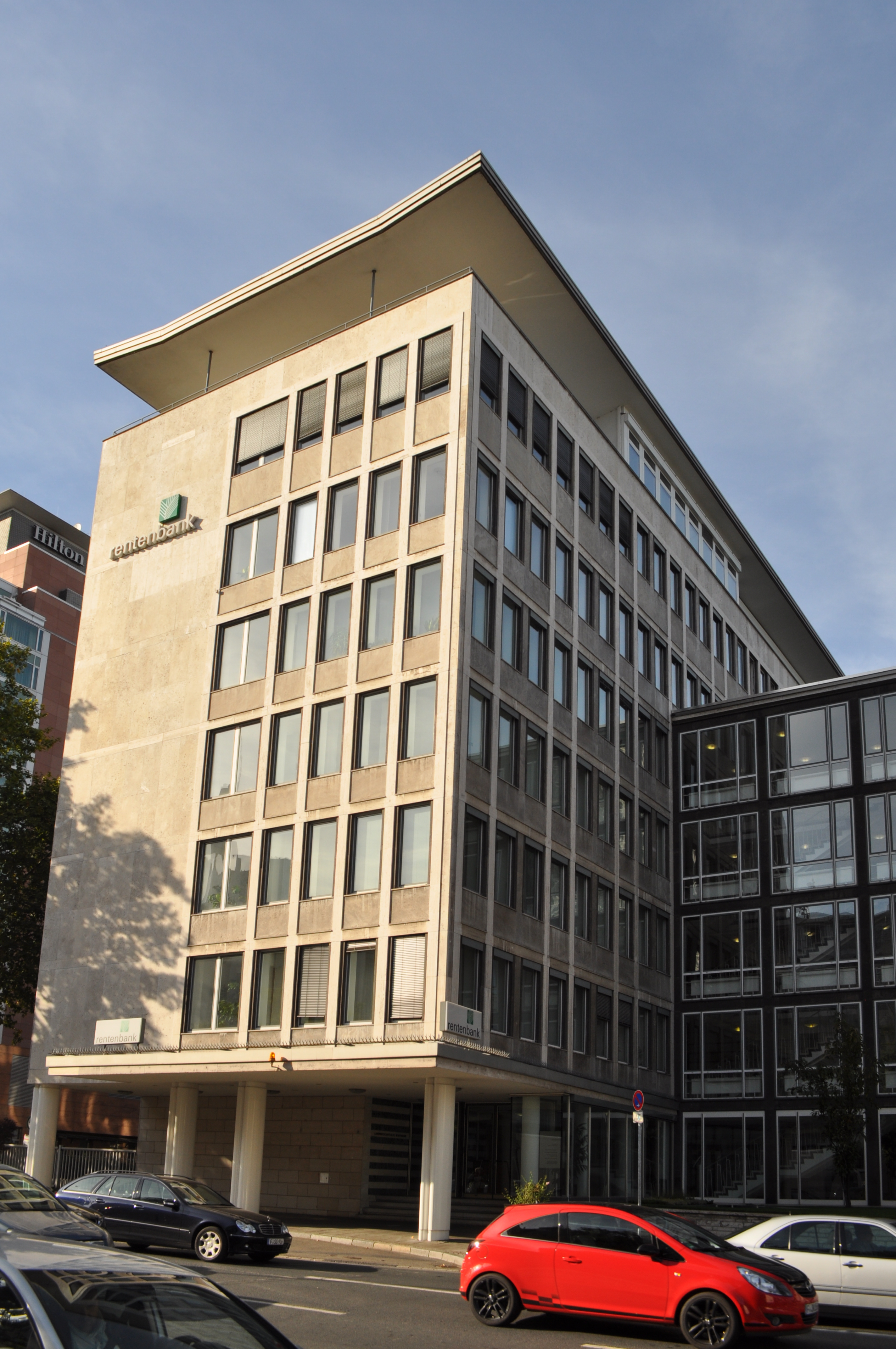 Denkmalgeschütztes Gebäude der Rentenbank in Frankfurt